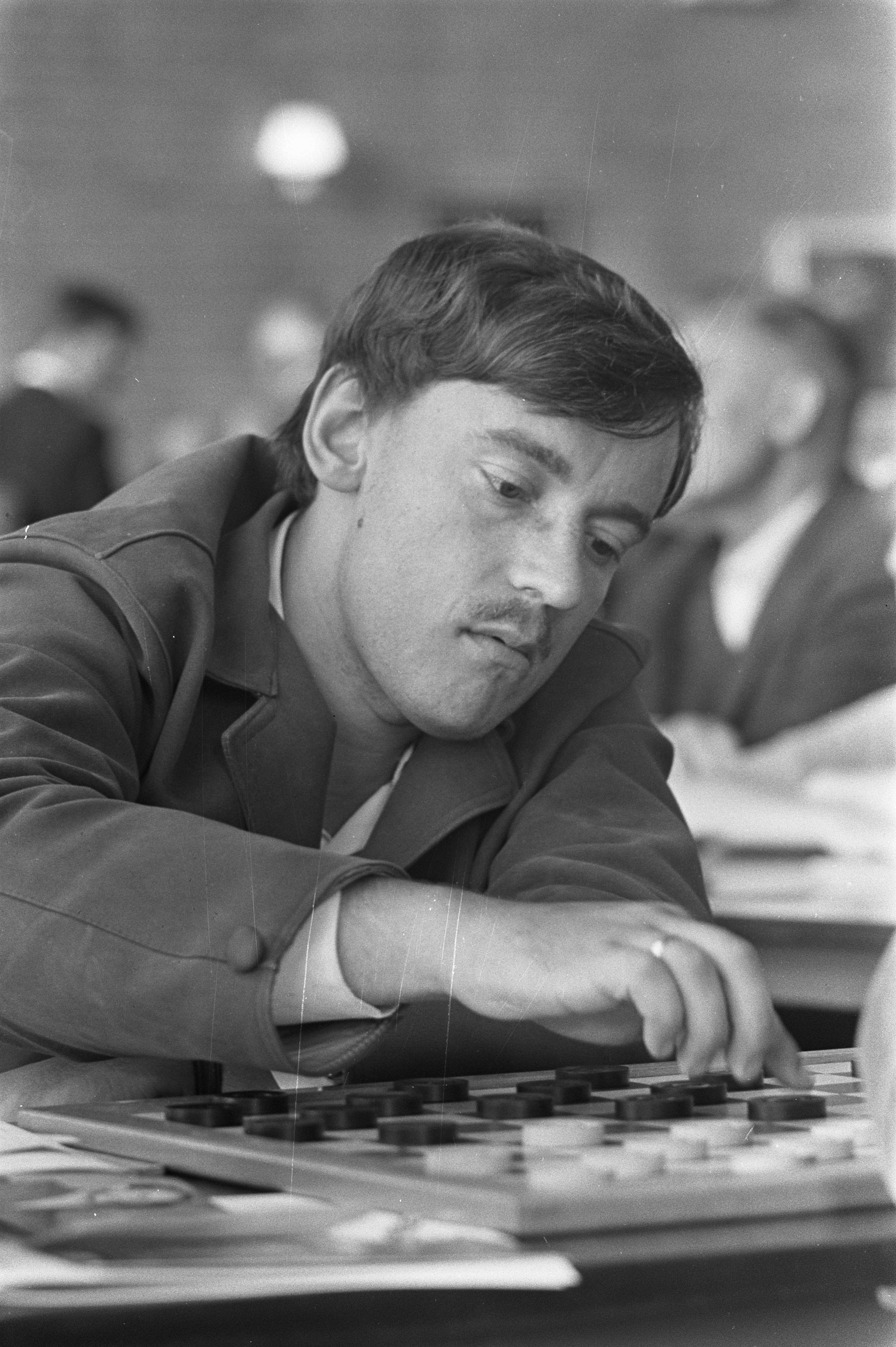 Collectie / Archief : Fotocollectie Anefo Reportage / Serie : [ onbekend ] Beschrijving : Dammen Nederland tegen Rusland. De Rus Andreiko aan zet Datum : 4 juli 1968 Trefwoorden : DAMMEN Persoonsnaam : Andreiko Fotograaf : Kroon, Ron / Anefo Auteursrechthebbende : Nationaal Archief Materiaalsoort : Negatief (zwart/wit) Nummer archiefinventaris : bekijk toegang 2.24.01.05 Bestanddeelnummer : 921-4886